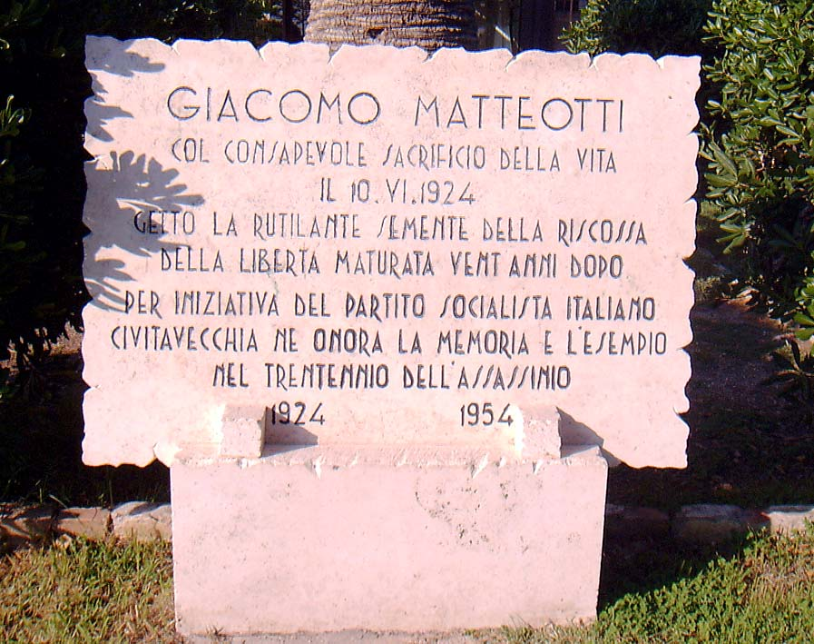 Targa commemorativa di Giacomo Matteotti a Civitavecchia (RM)